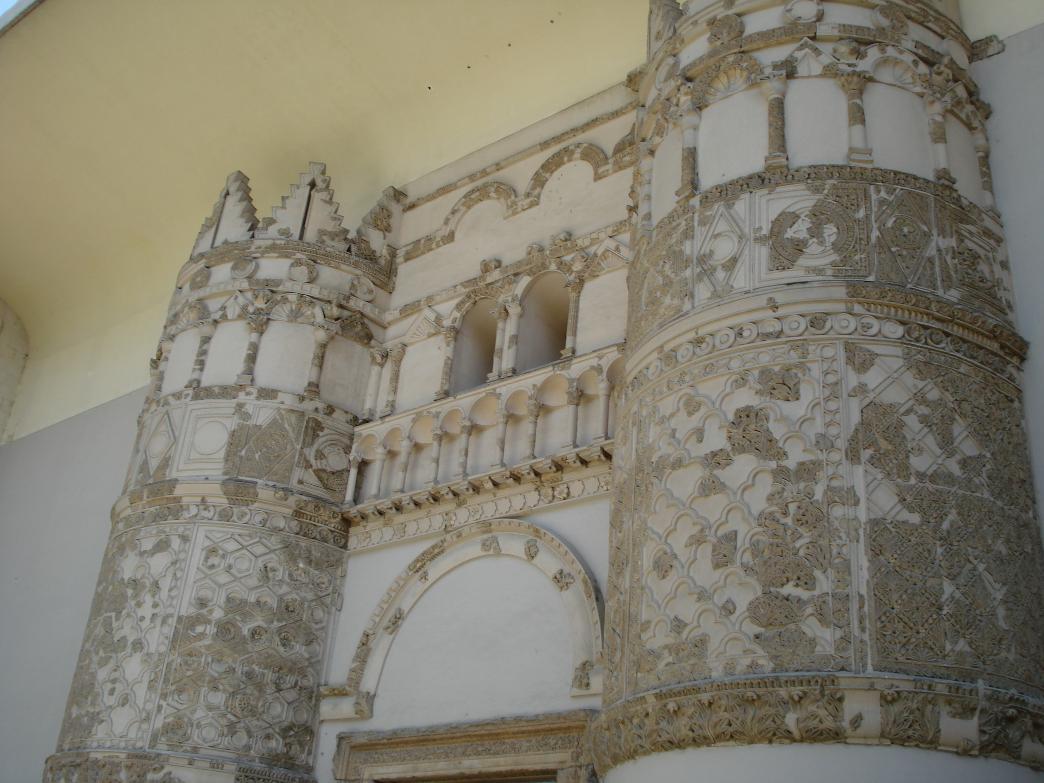 واجهة قصر الحير الغربي الذي تم نقله ليصبح واجهة متحف دمشق الوطني